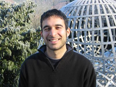 Foto di Mihalis Dafermos